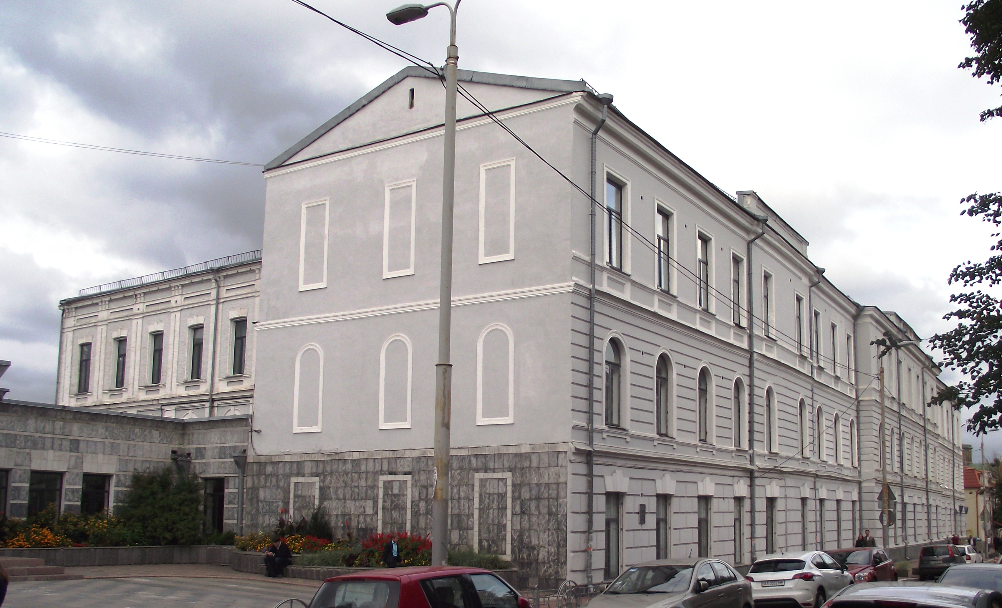 1799—1801 рр